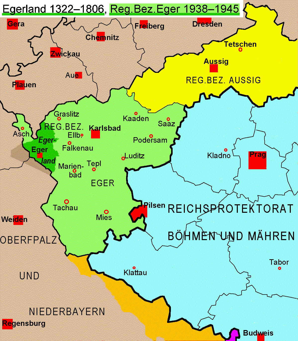 NS occupation "Regierunsgbezirk Eger" 1938–1945 and historical Egerland/Chebsko 1322 –1806